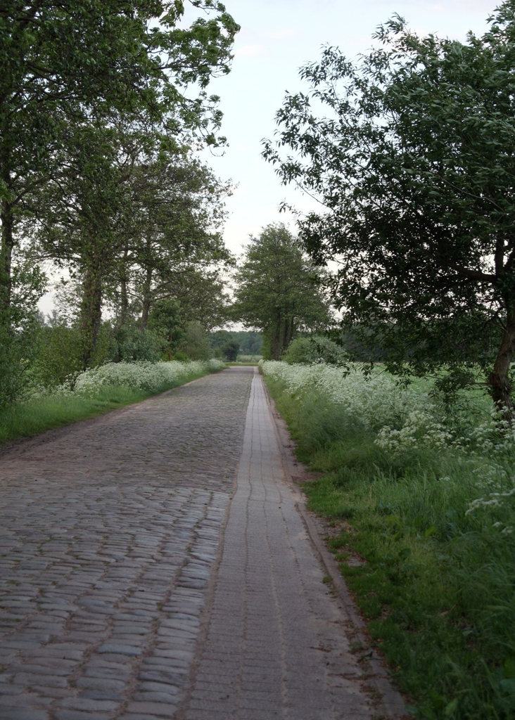 a way in Wardenburg, Niedersachsen, Germany